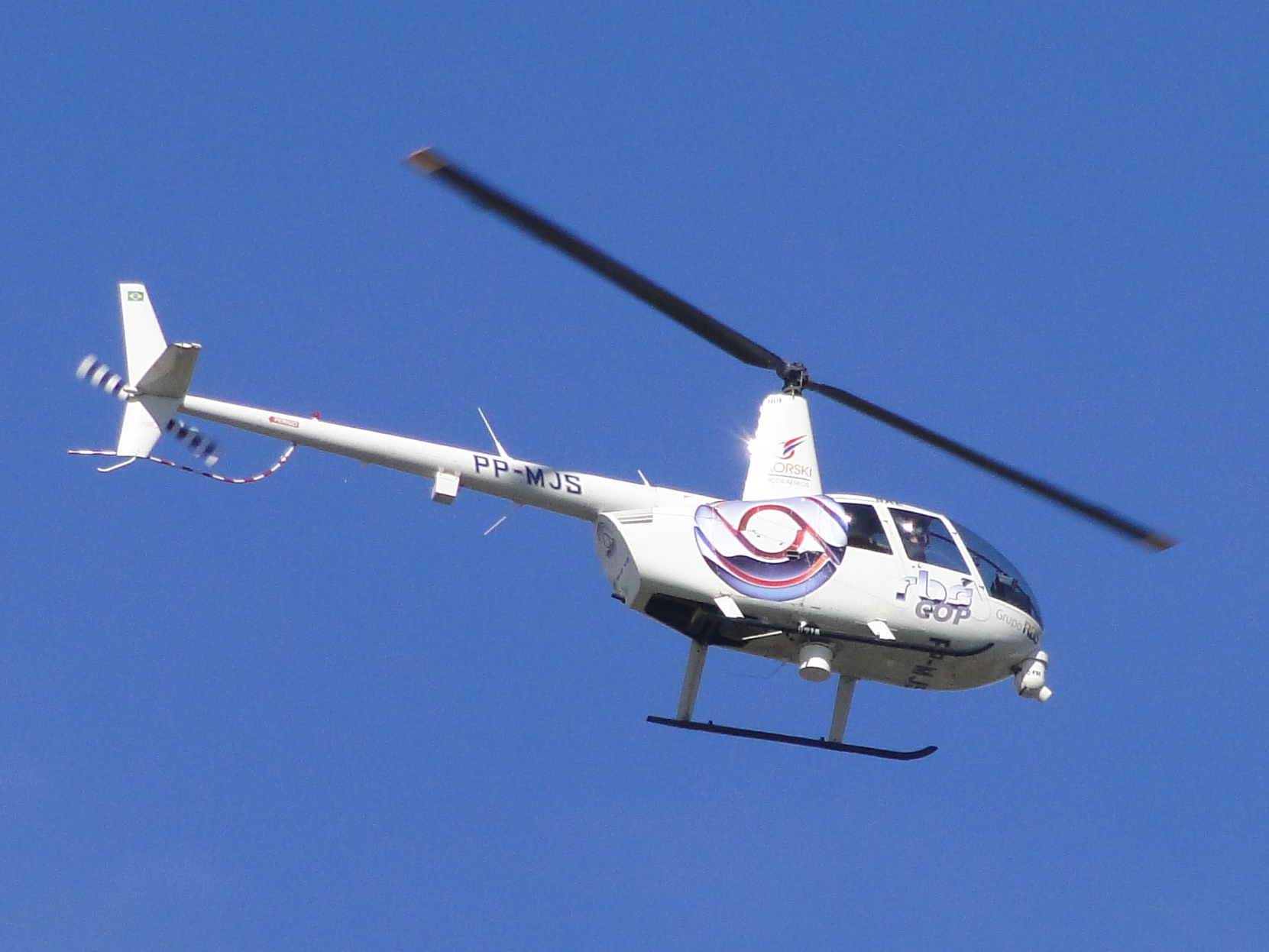 RBS Cop sobrevoando Porto Alegre.